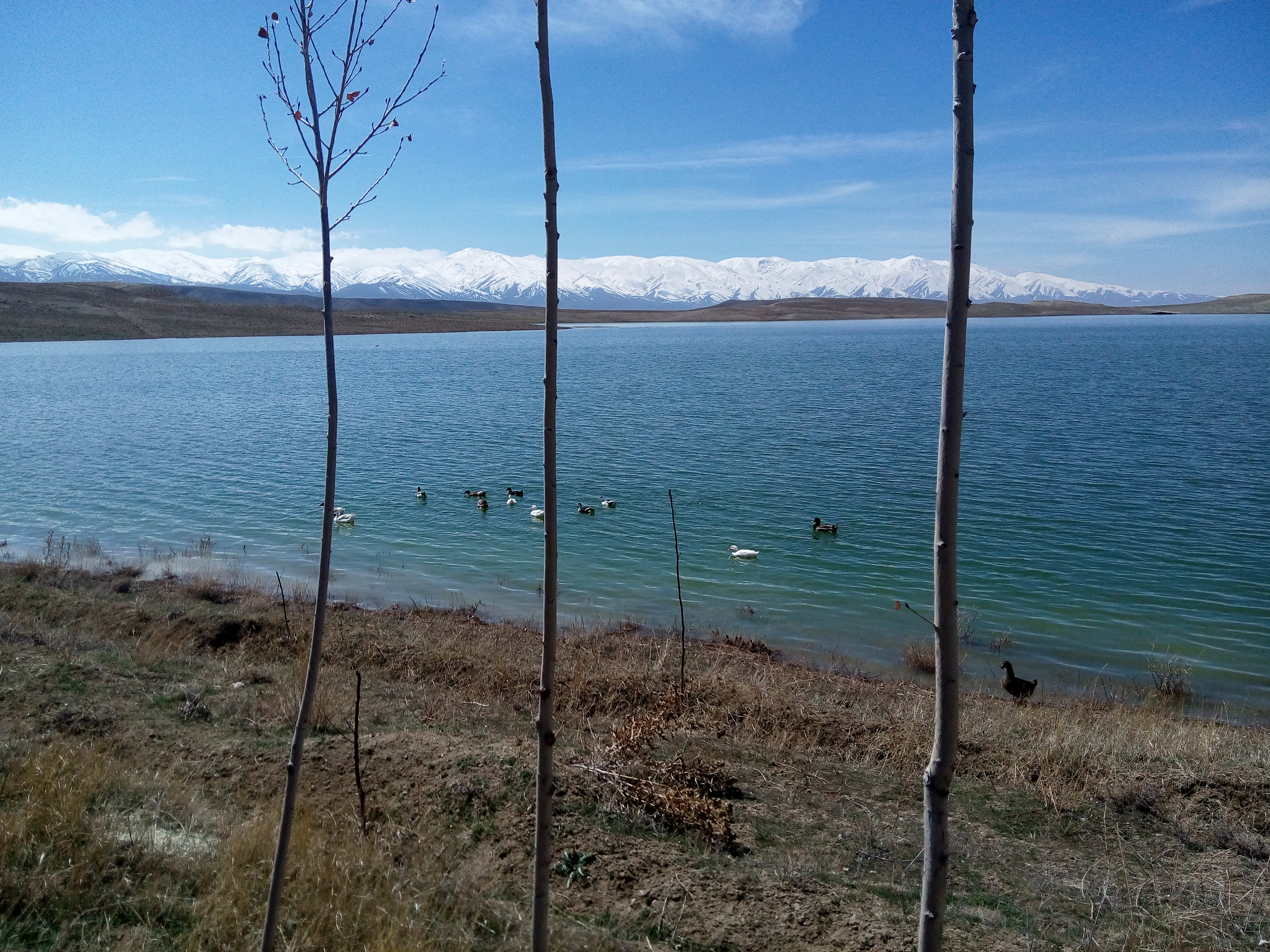 سد طبیعی روستای شوره دل عید نوروز1394